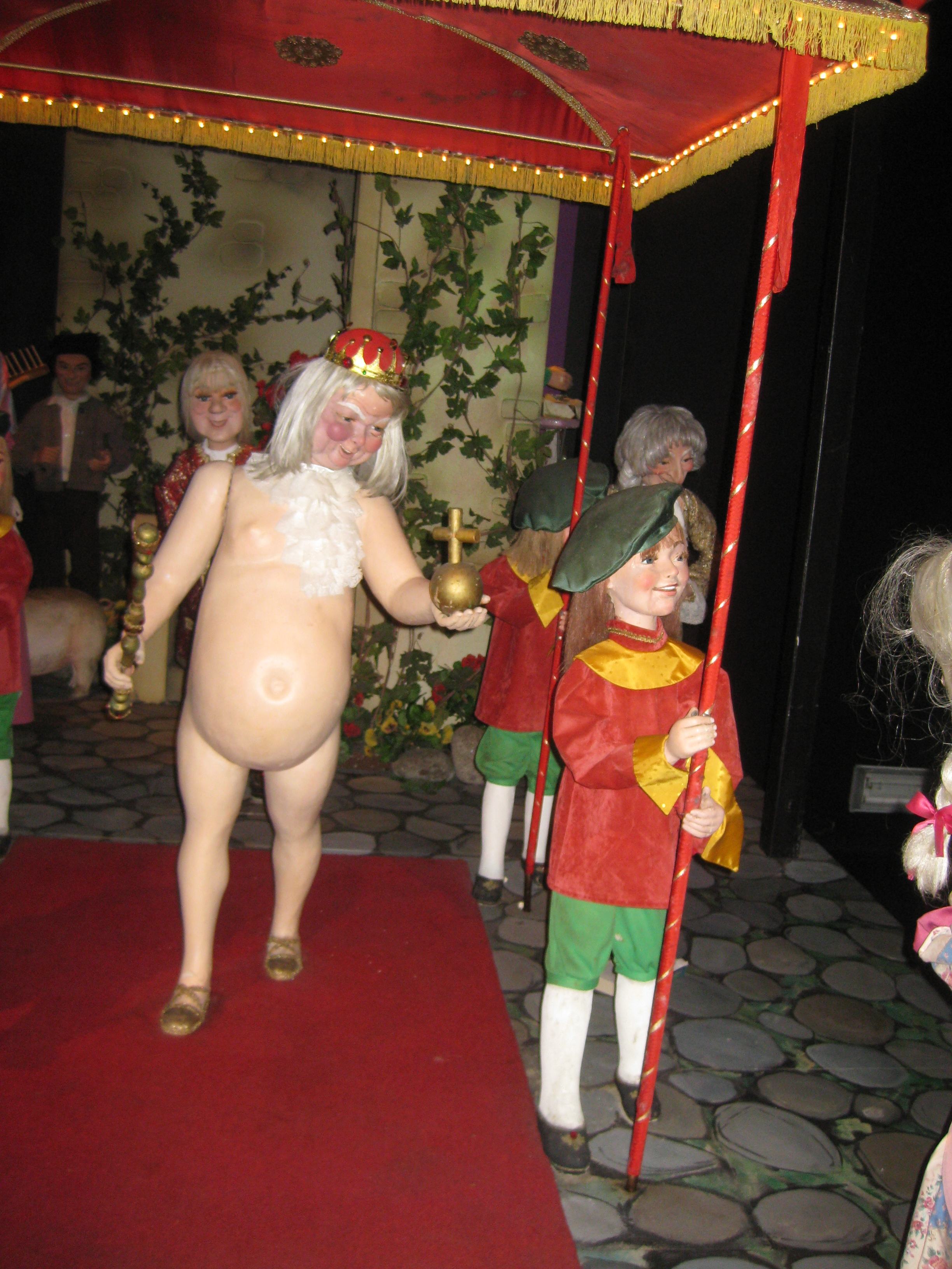 Scen från "Kejsarens nya kläder" på Sagoslottet, Liseberg.